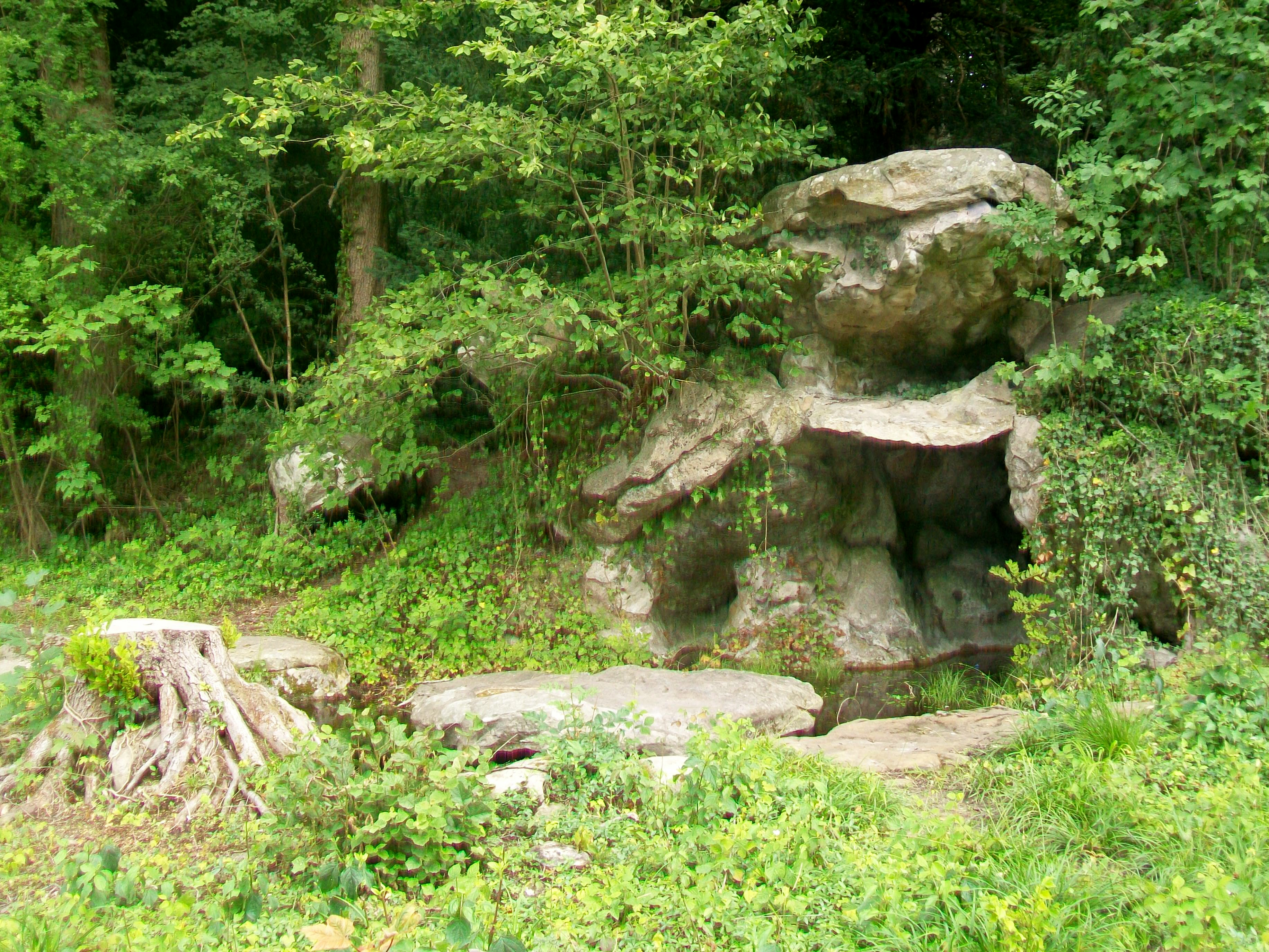 Grotte près de la rivière anglaise.